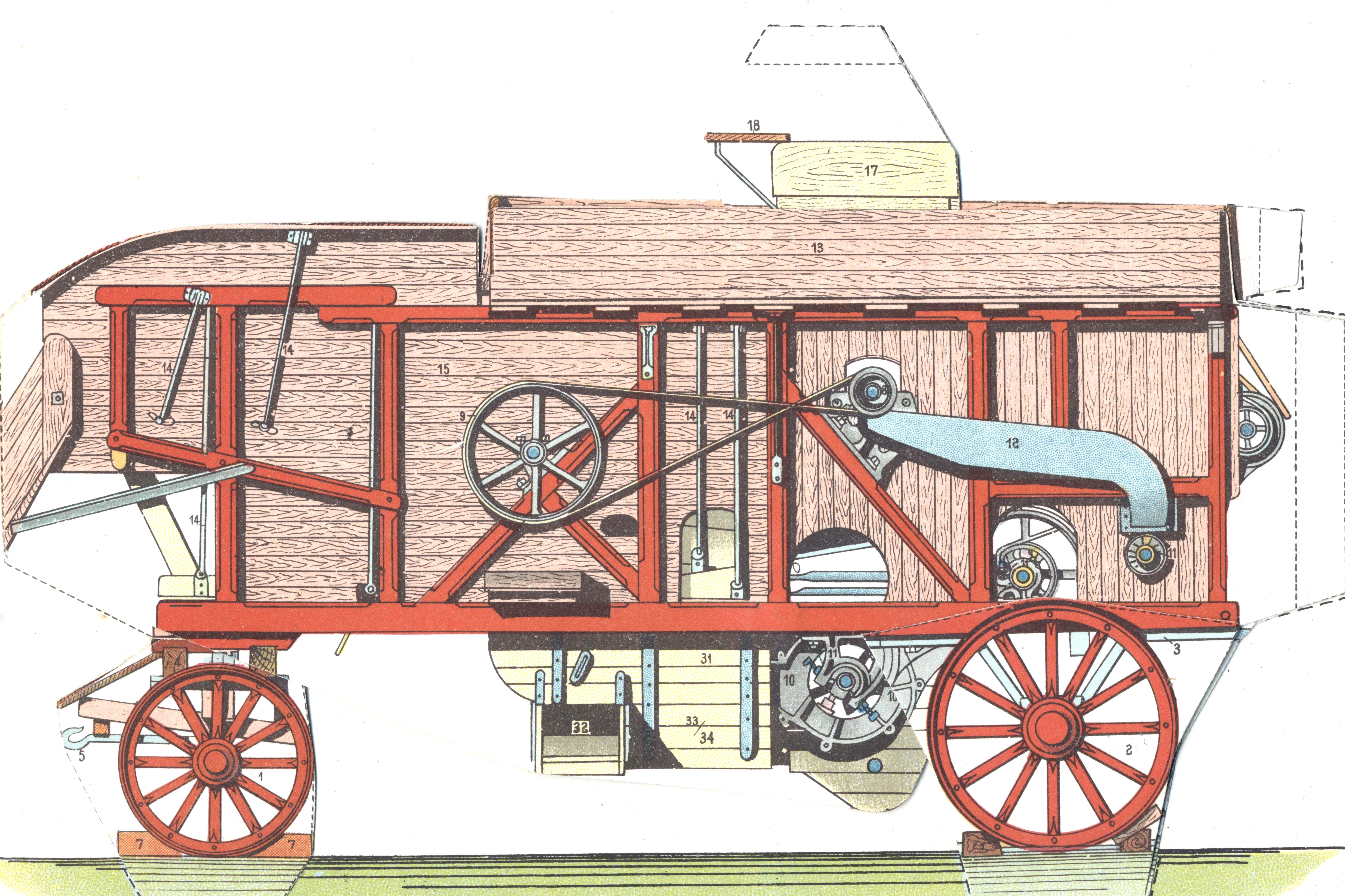 Dreschmaschinn Plang 1 Kategorie:Landwirtschaftlech Maschinnen